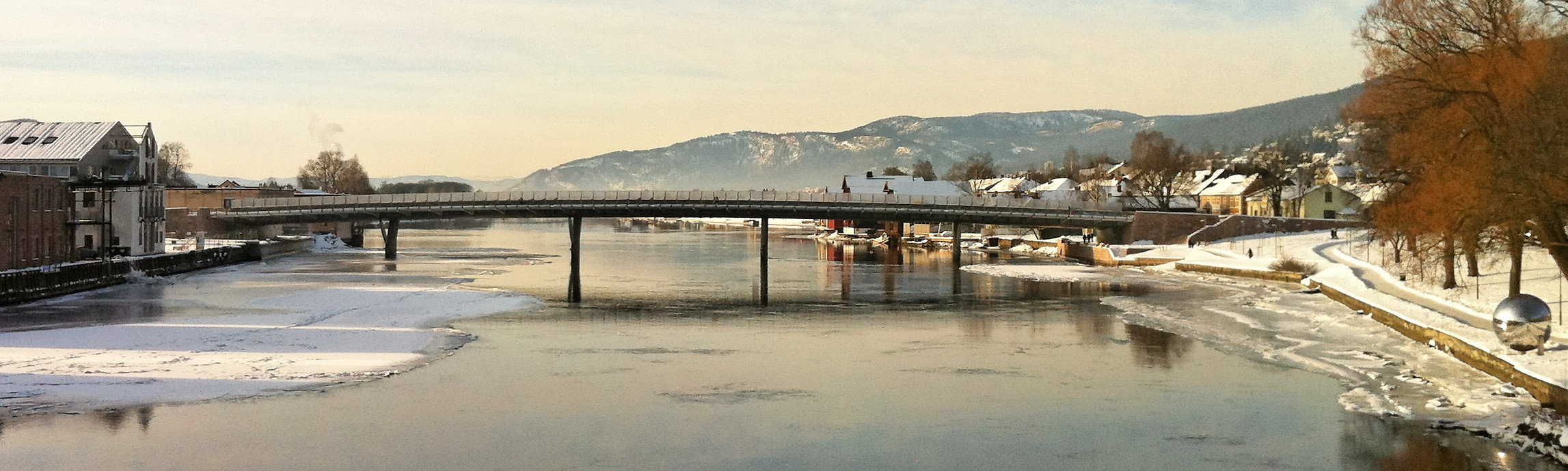 Øvre Sund bru i Drammen.